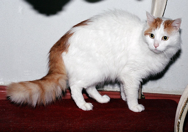 Կարեն Մանվելյանի Արփի Վանա կատուն